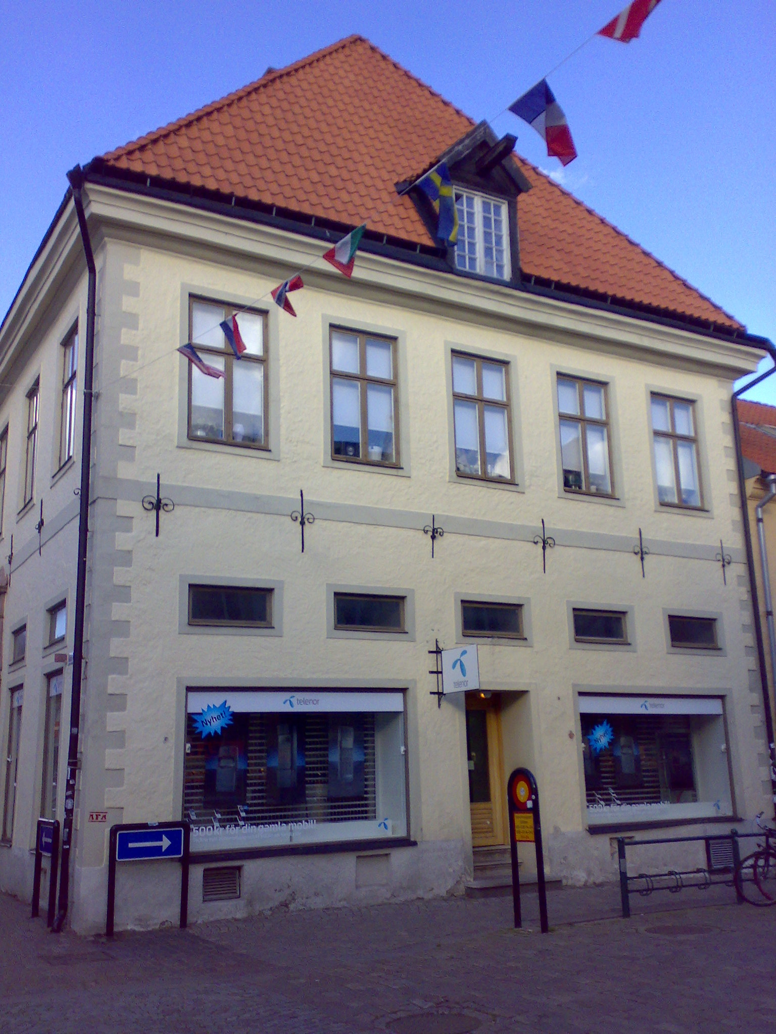 Telenor store, Kalmar Sweden